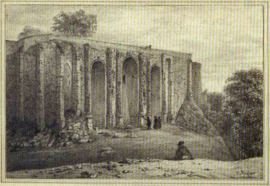 Porte Mars et tour antique plan Maquart de 1850 sur la place de la République de Reims.